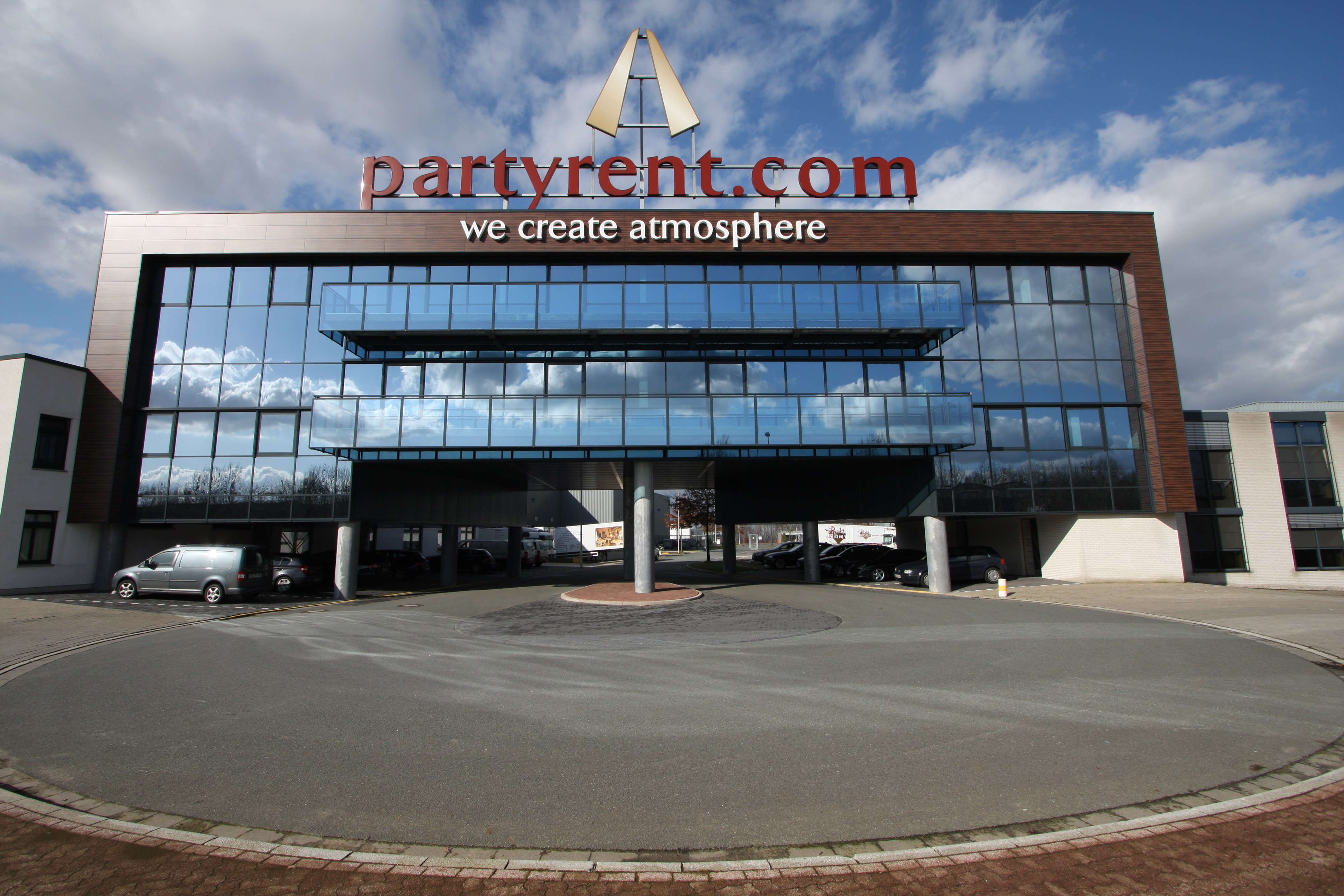 Party Rent Zentrale Bocholt